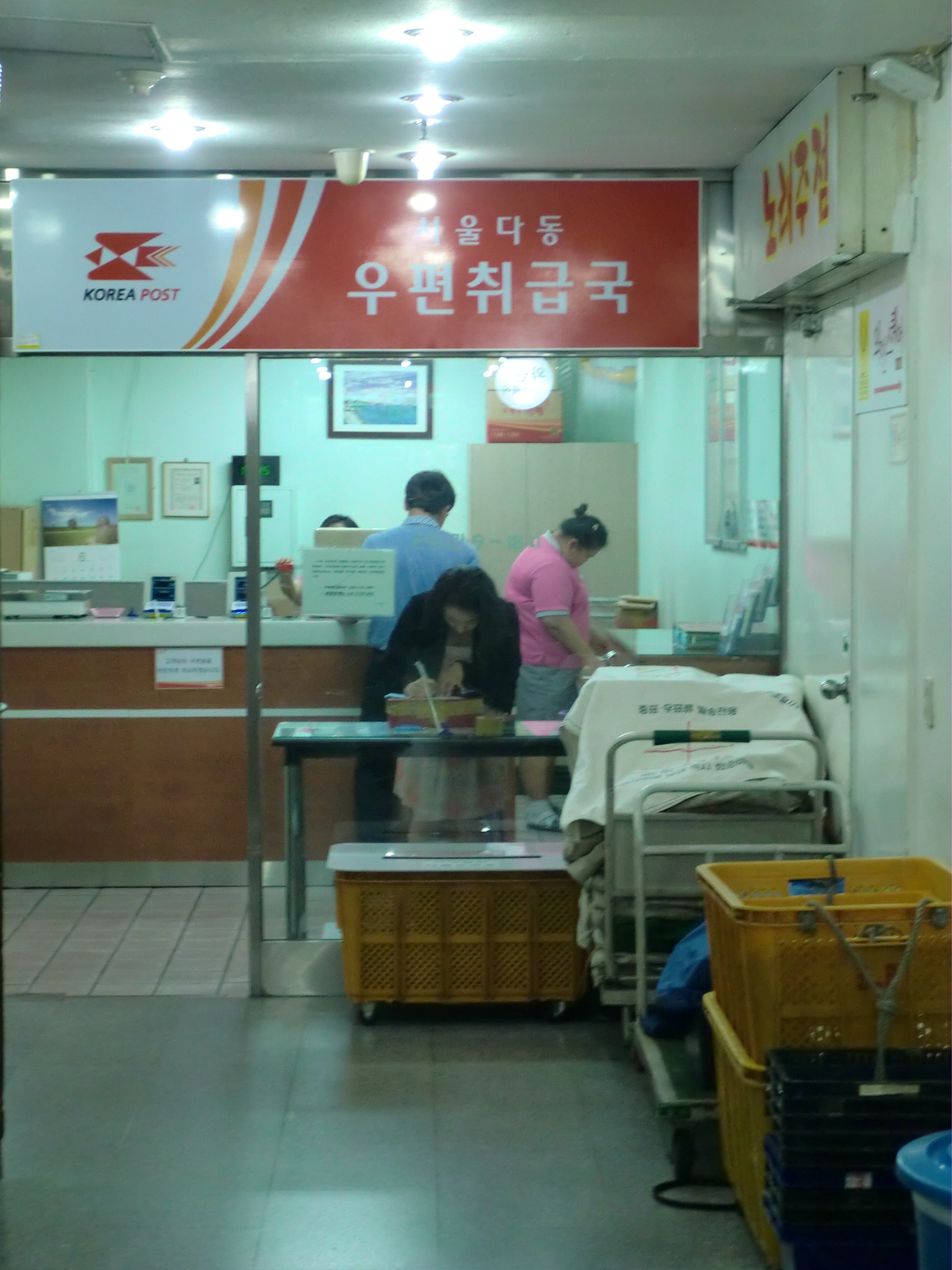 서울툭별시 중구에 있는 서울다동 우편취급국